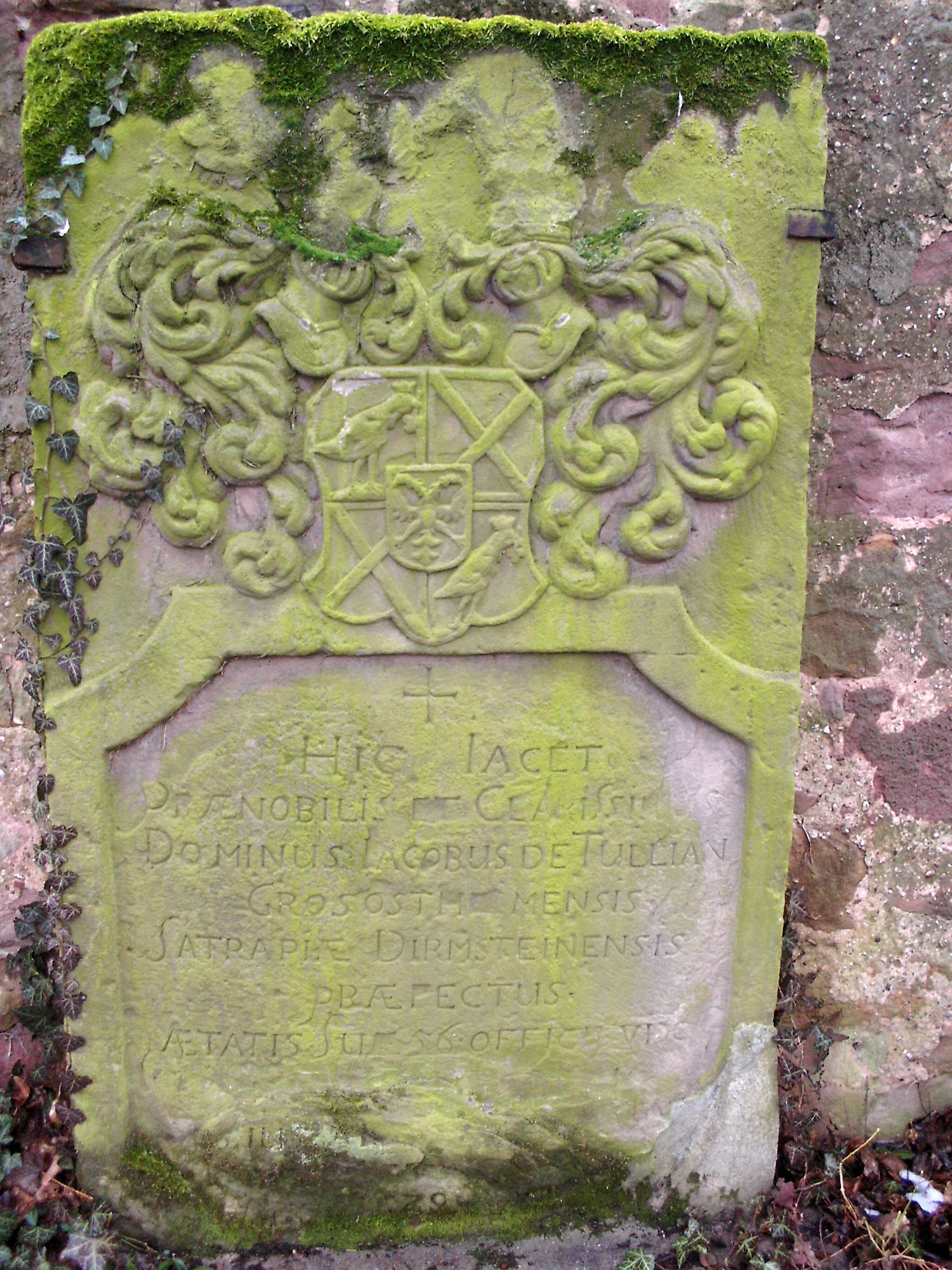 Jakob von Tullian, bischöflicher Amtmann in Dirmstein, Grabstein 1729